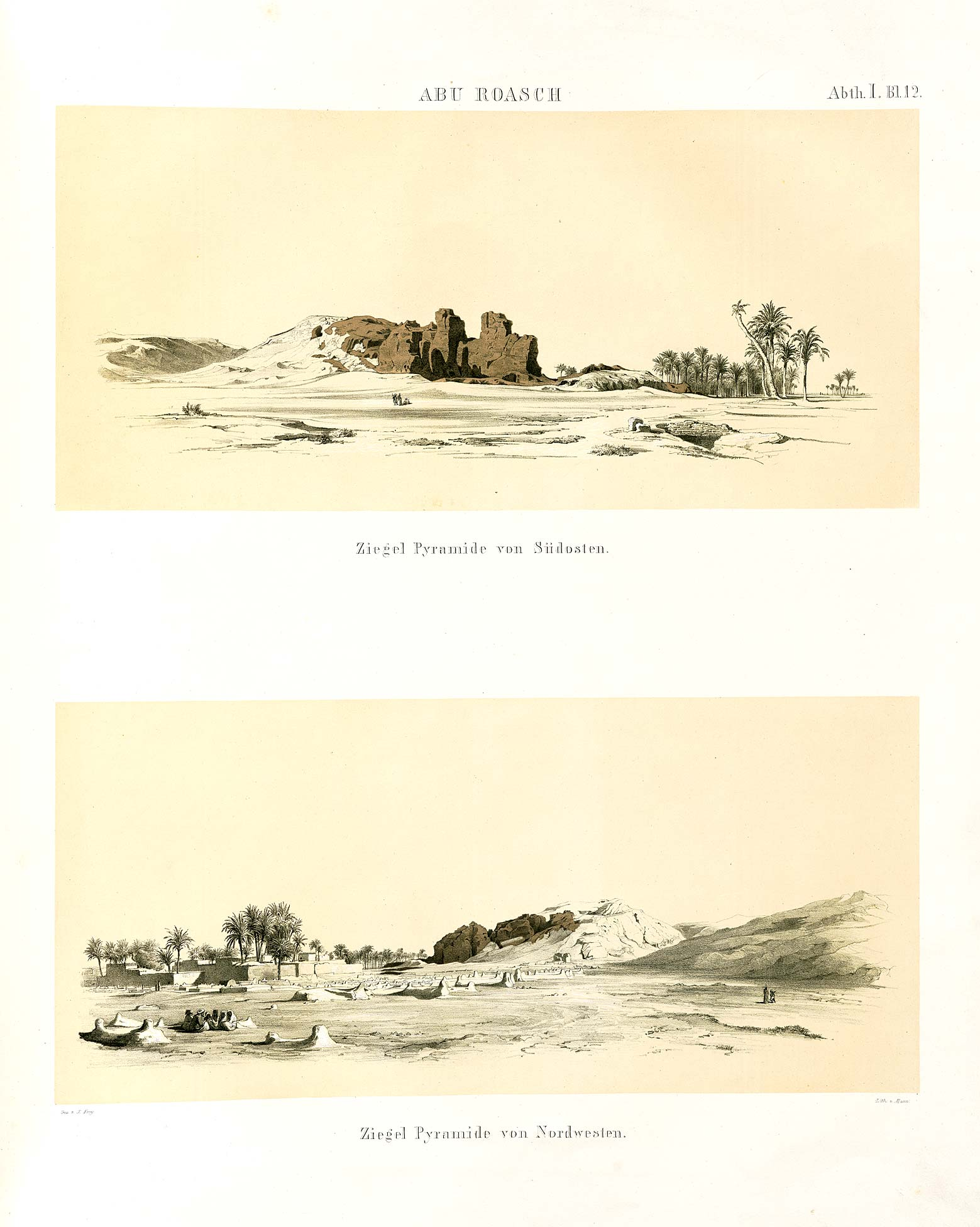 Denkmaeler aus Aegypten und Aethiopien nach den Zeichnungen der von Seiner Majestät dem Koenige von Preussen, Friedrich Wilhelm IV., nach diesen Ländern gesendeten, und in den Jahren 1842–1845 ausgeführten wissenschaftlichen Expedition auf Befehl Seiner Majestät